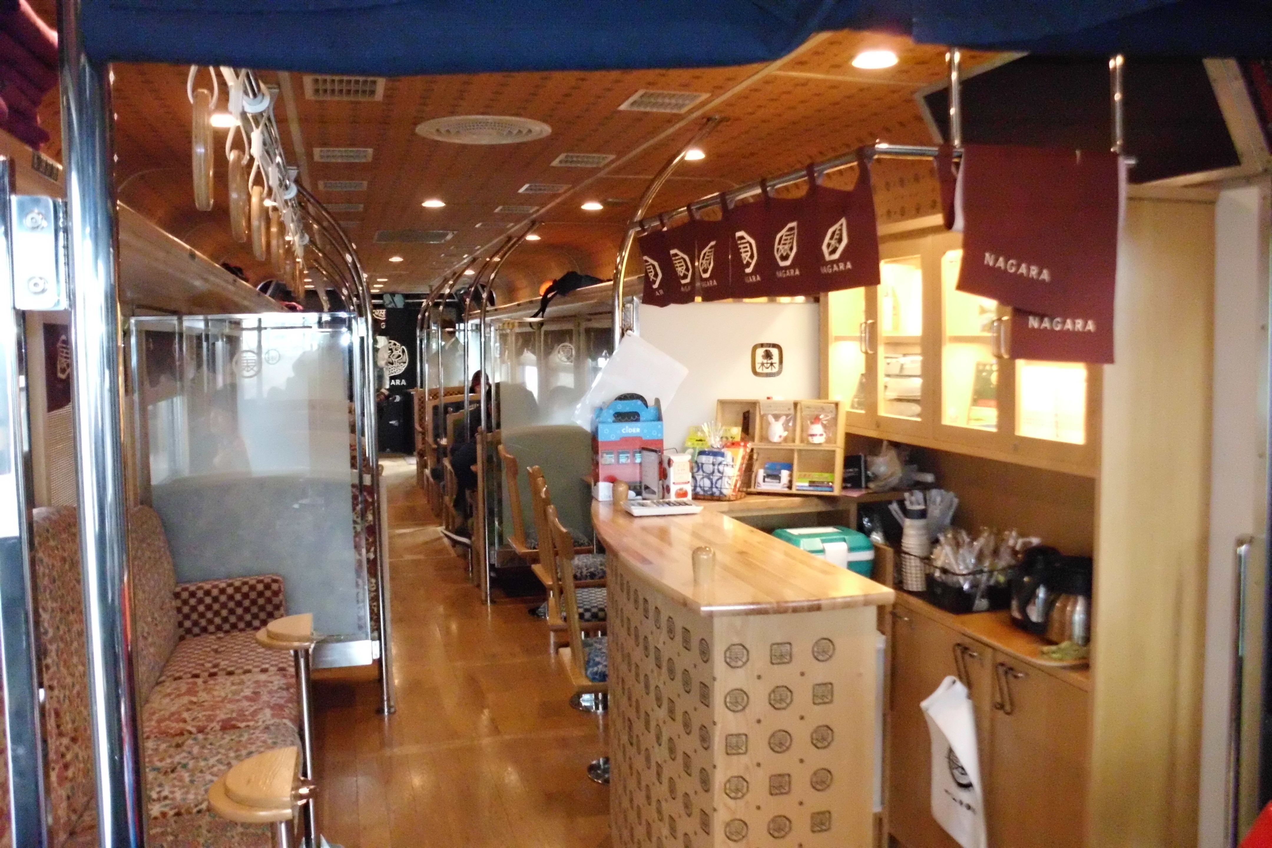 長良川鉄道ナガラ300形を改装した観光列車「ながら」１号車（森号）の車内、サービスカウンター